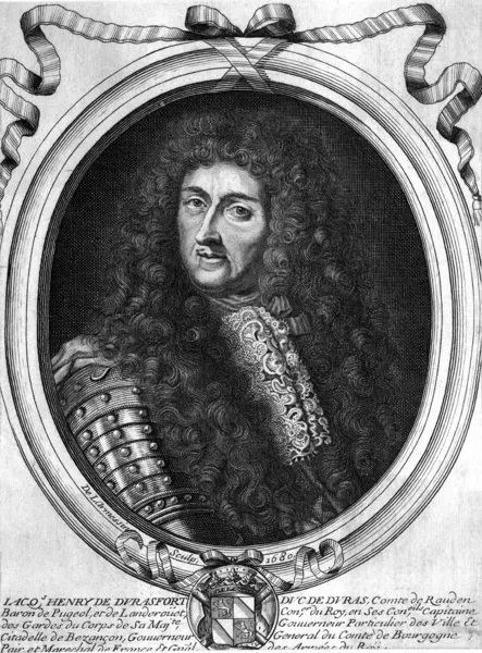 Gravure avec le portrait de Jacques Henri de Durfort, maréchal de France (1625-1704)